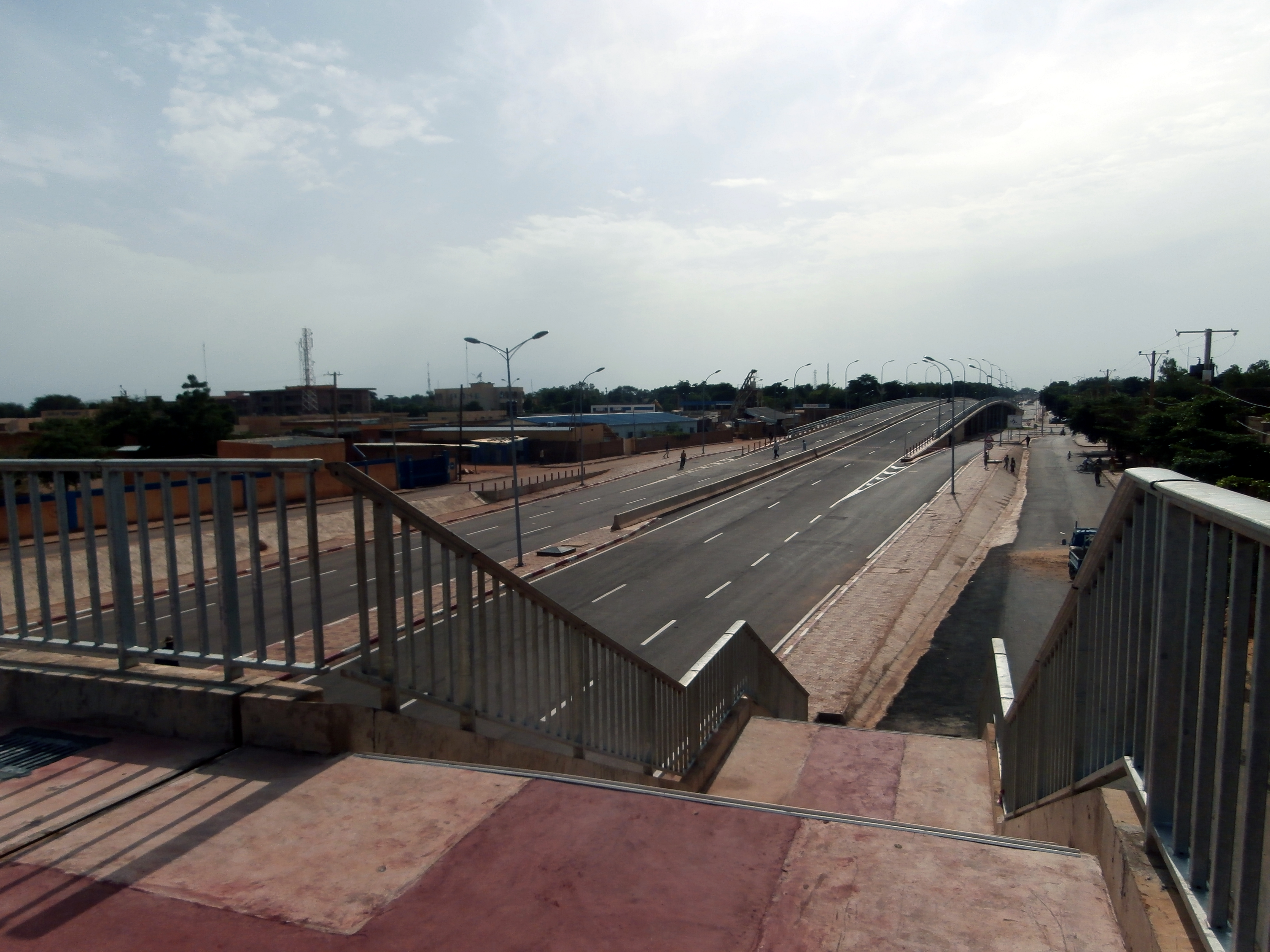 Nouveau échangeur de Niamey